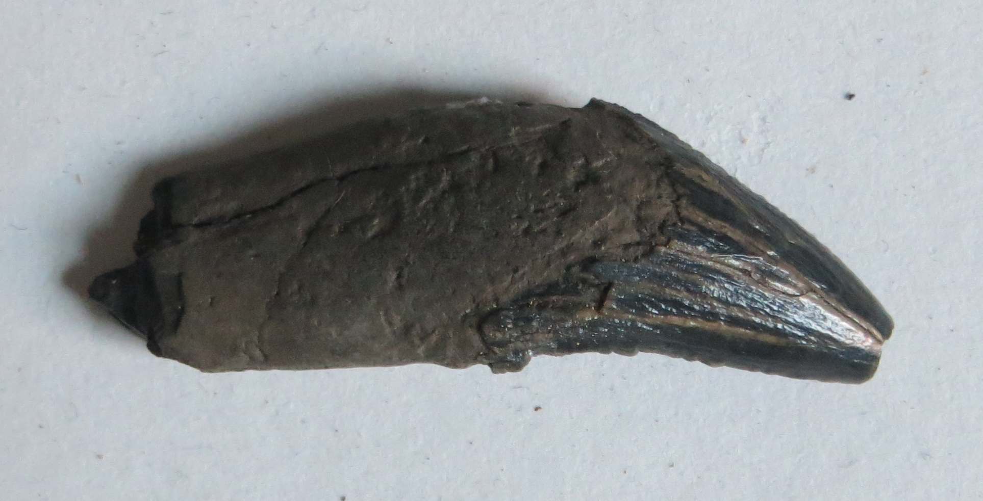 Fossil of Squalodon, an extinct mammal- Took the picture at Teylers Museum, Haarlem